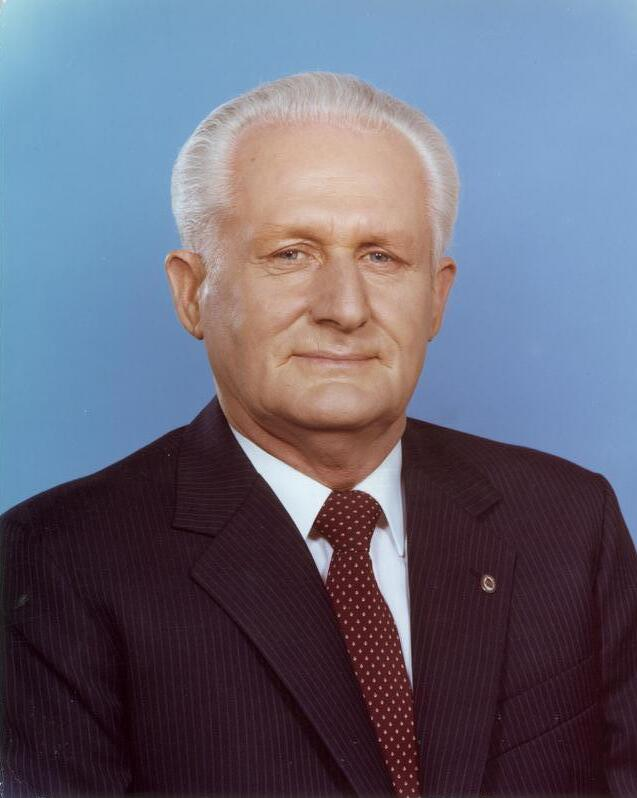 ADN-ZB/DEWAG/18.6.84 Mittag, Günter Mitglied des Politbüros und Sekretär des ZK der SED, Stellvertreter des Vorsitzenden des Staatsrates der DDR. Aufn.: 5.6.84